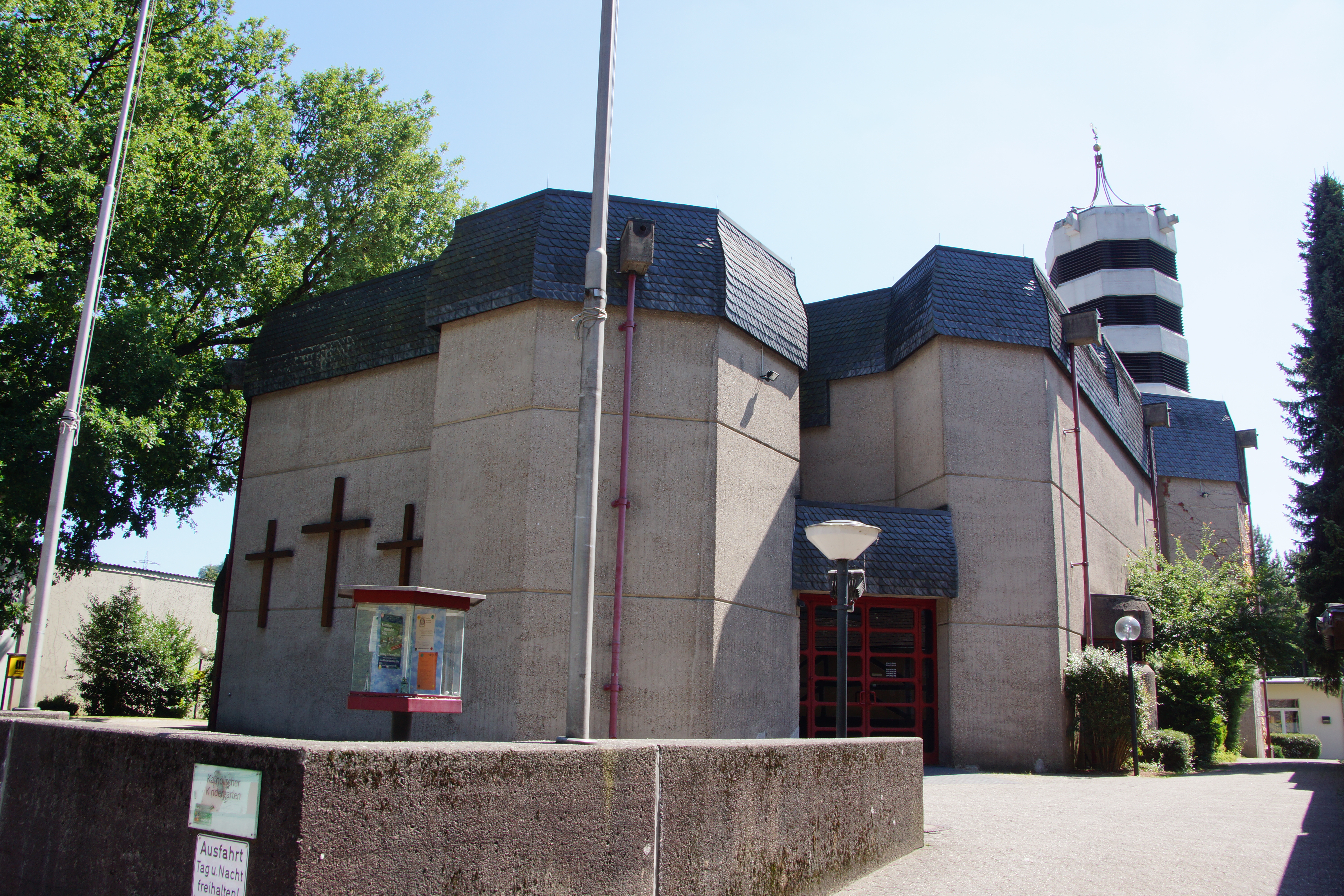 Pfarrkirche Herz Jesu in Dieringhausen, Gummersbach, North Rhine-Westphalia, Dieringhauser Straße 111